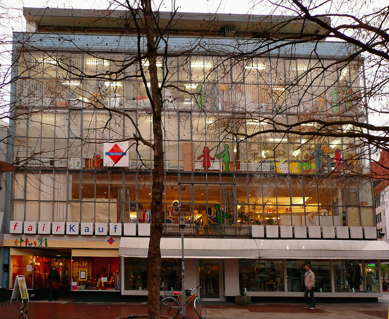 Secondhandkaufhaus in Hannover